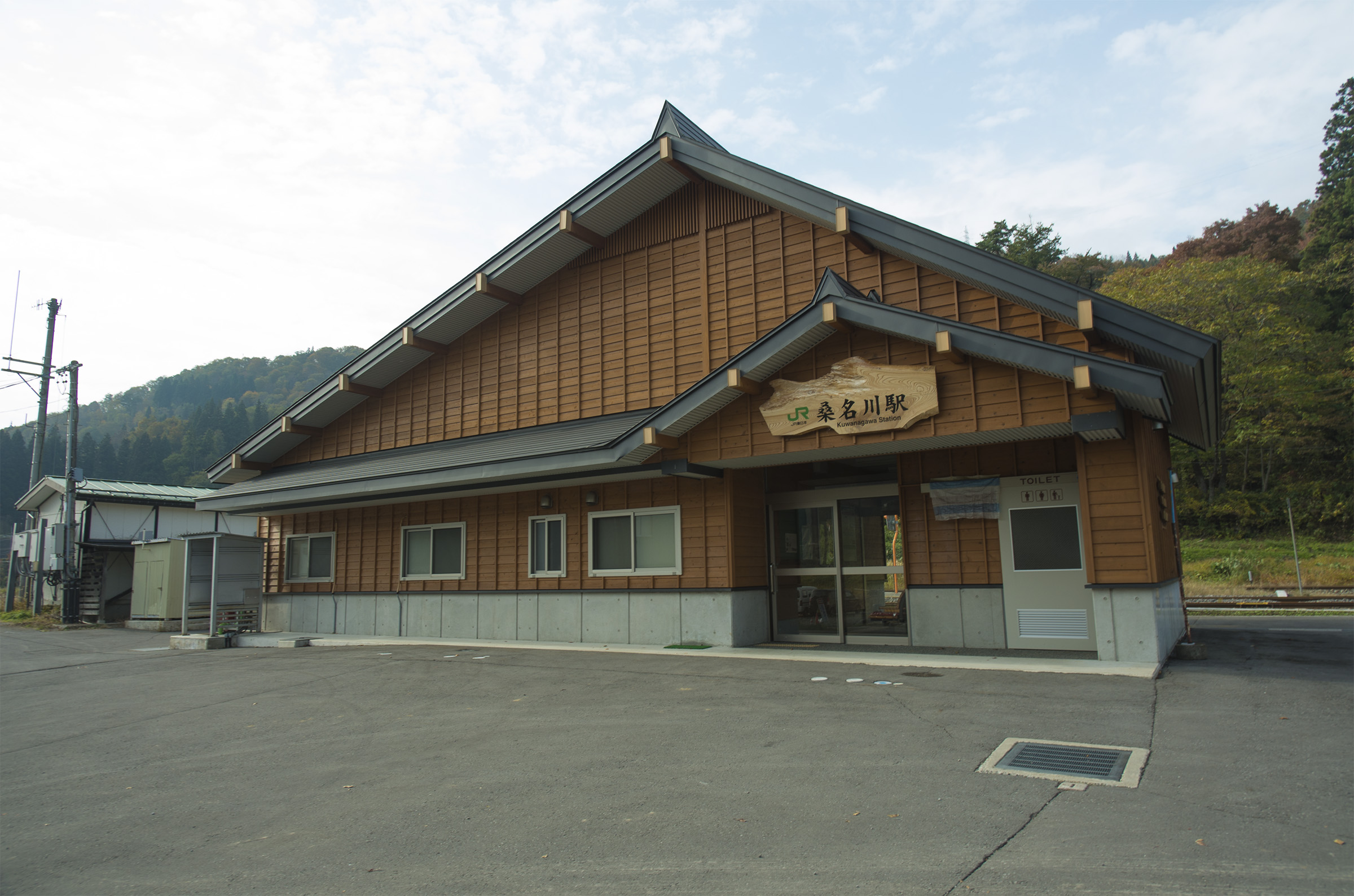 東日本旅客鉄道株式会社飯山線桑名川駅